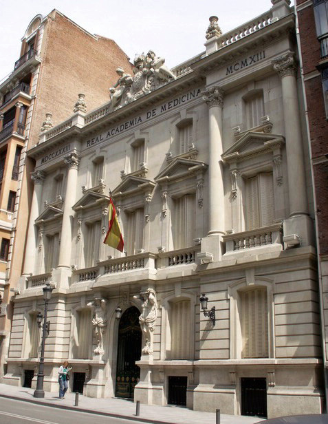 Real Academia Nacional de Medicina, calle de Arrieta, 12, Madrid. Construido por Luis Mª Cabello Lapiedra entre 1910 y 1913.